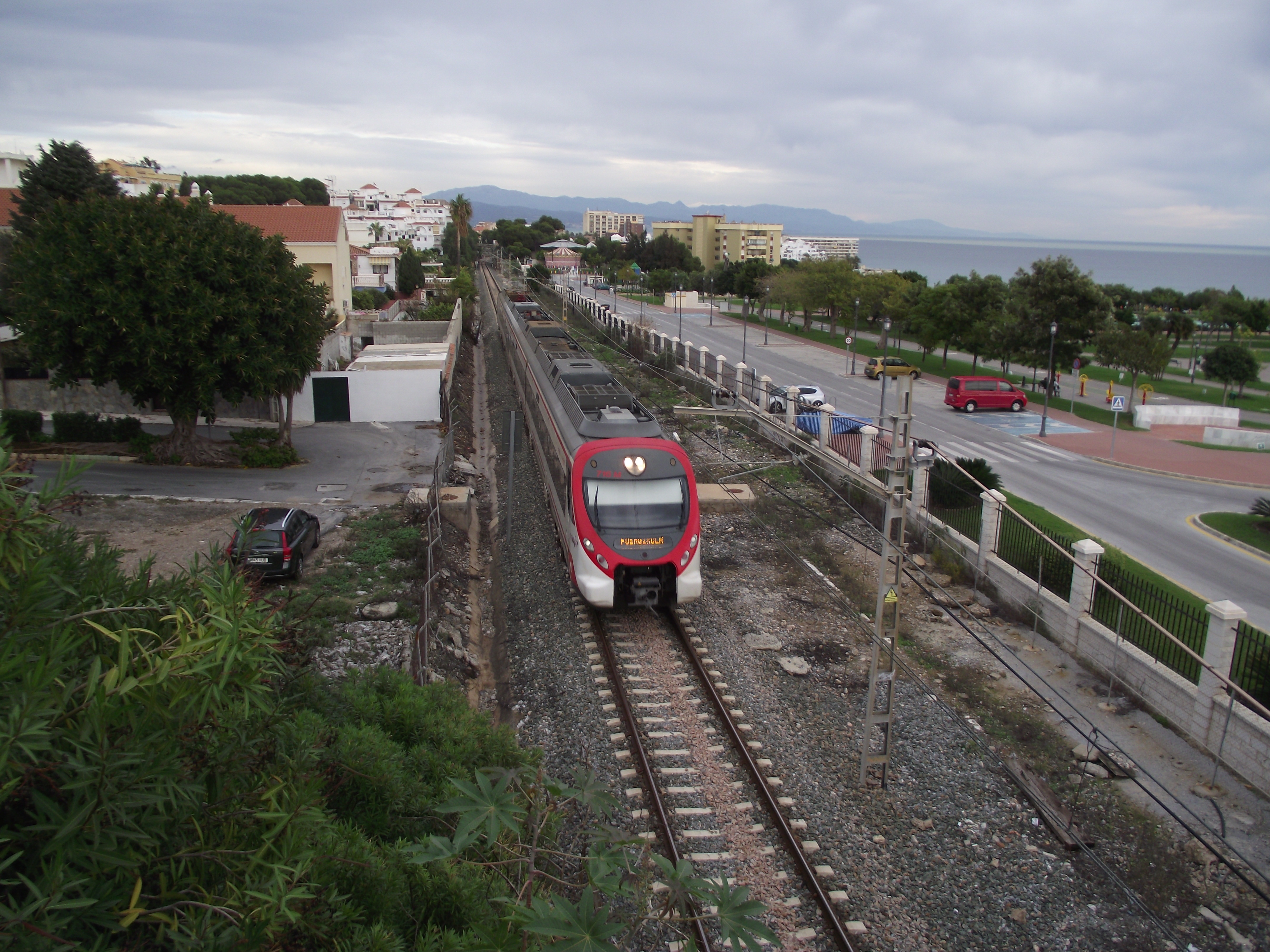 Zicht op de baai vanaf de brug bij Montemar Alto